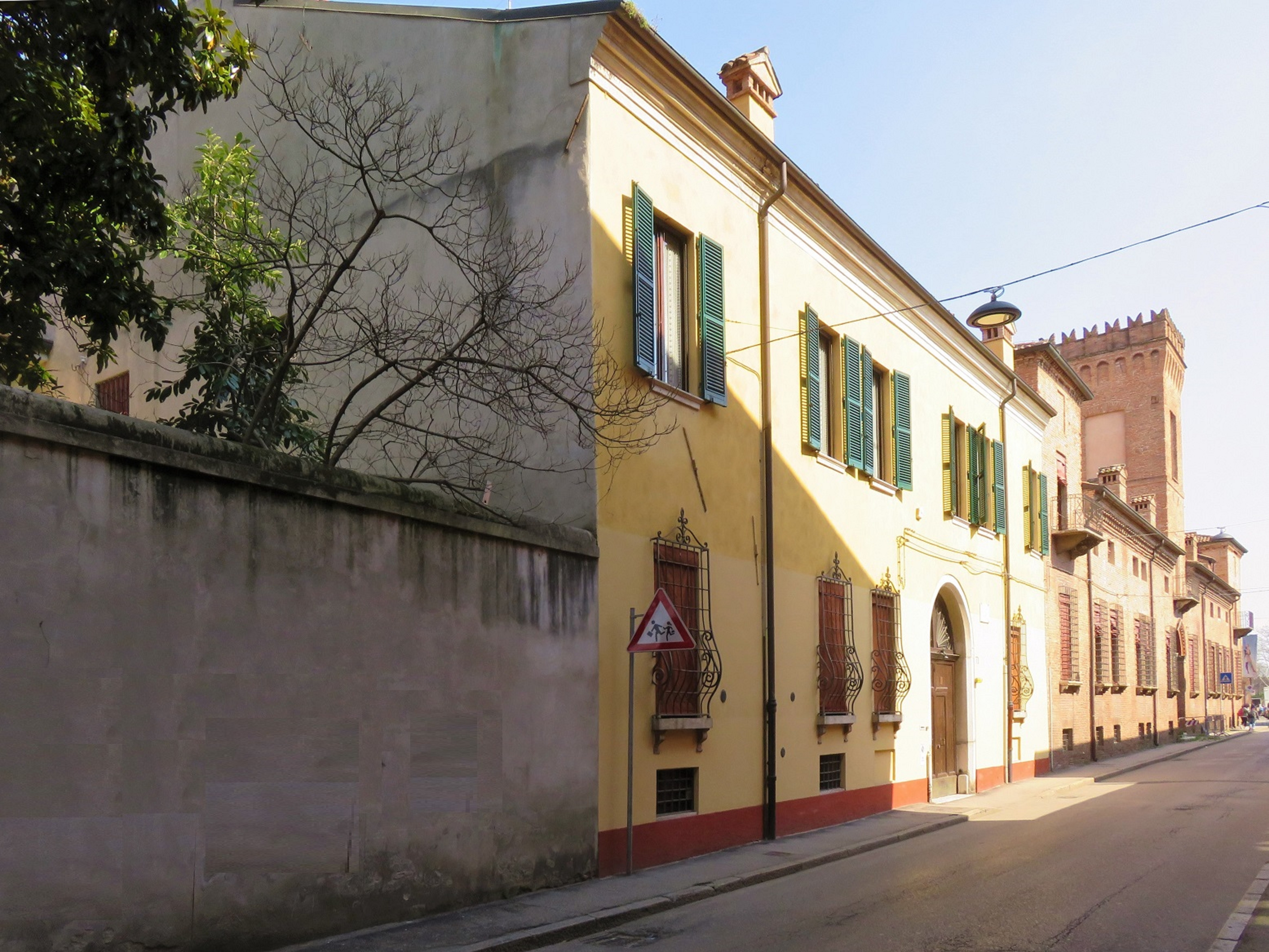 Angolo di Cisterna del Follo con la magnolia